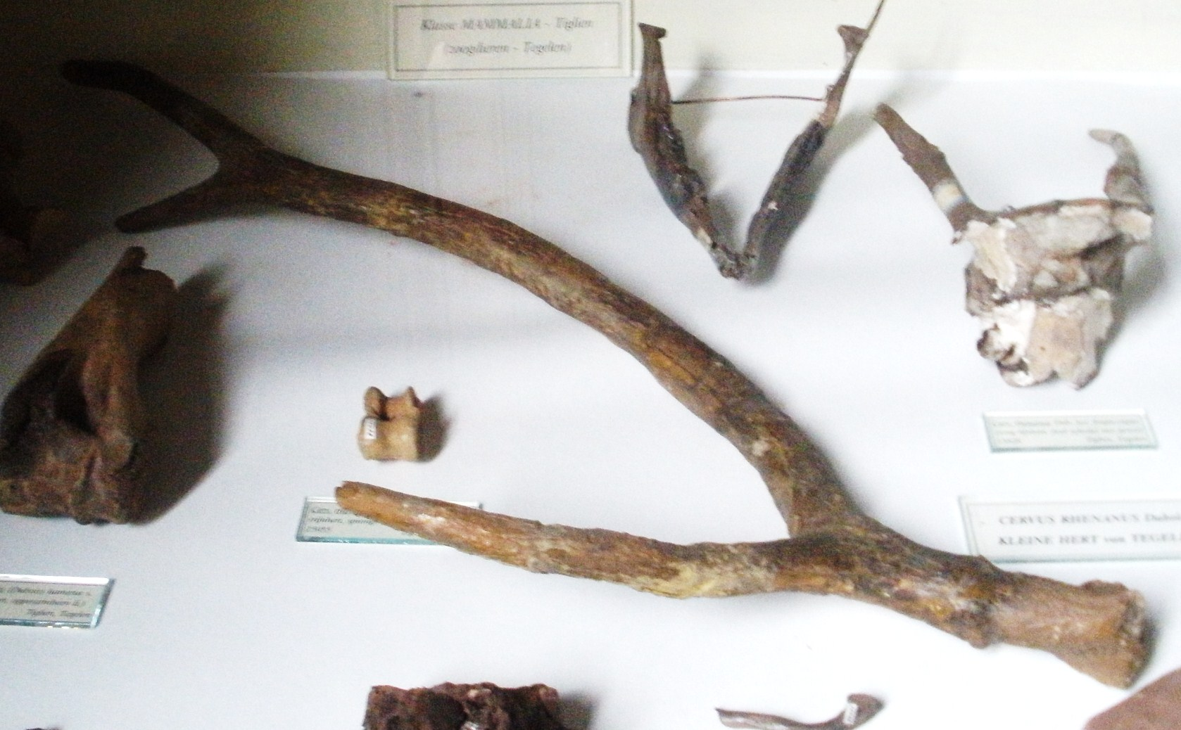 Fossil of Cervus rhenanus, an extinct deer - Took the photo at Teylers Museum, Haarlem